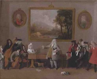 Marco Ricci Prova di un'opera 1709